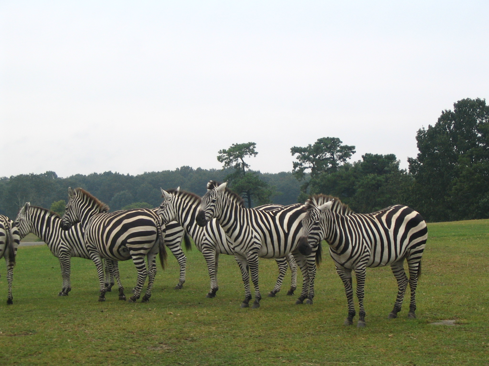 Jaz McKay